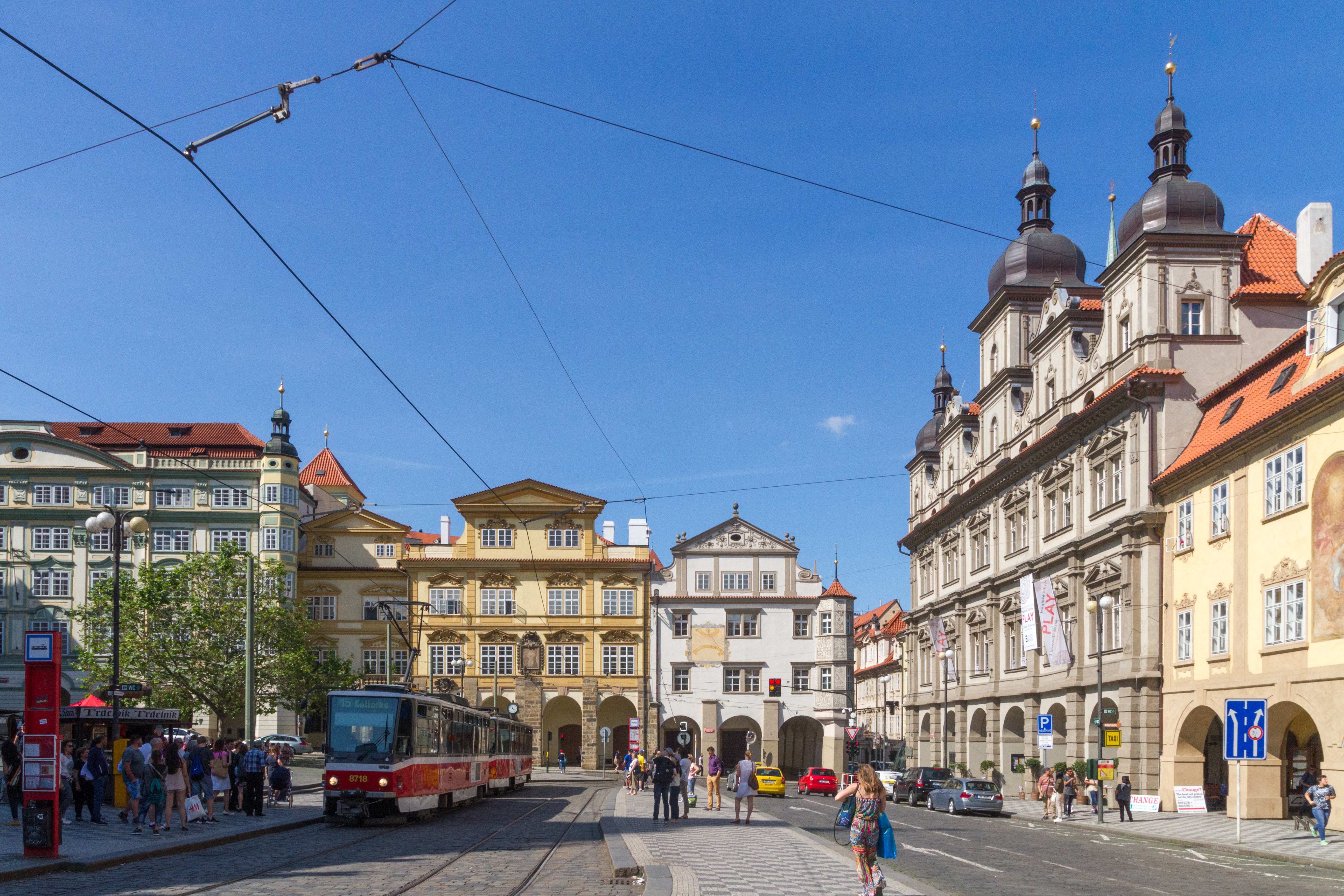 Malostranské náměstí